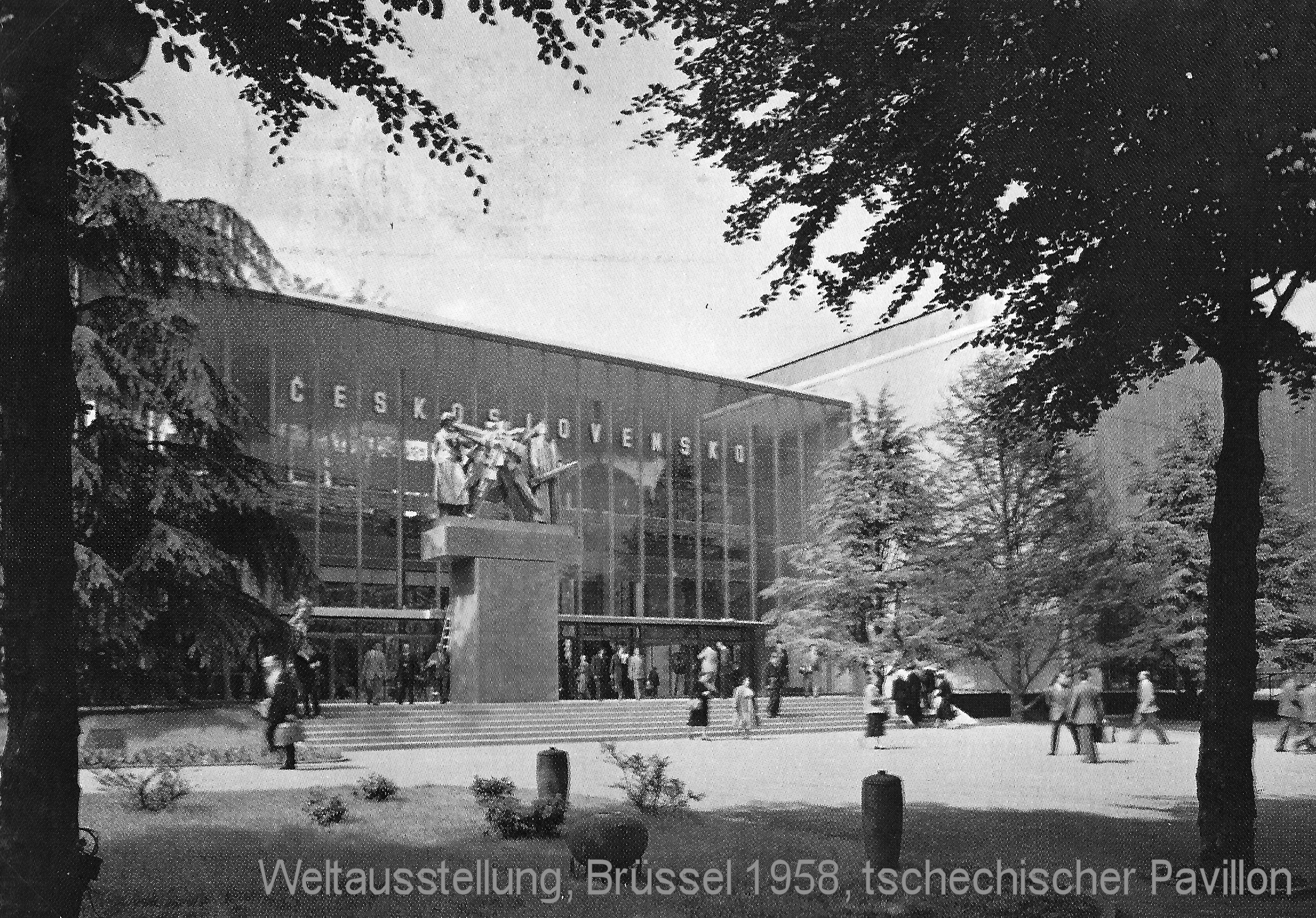 Tschechischer Pavillon auf der Weltausstellung 1958 in Brüssel